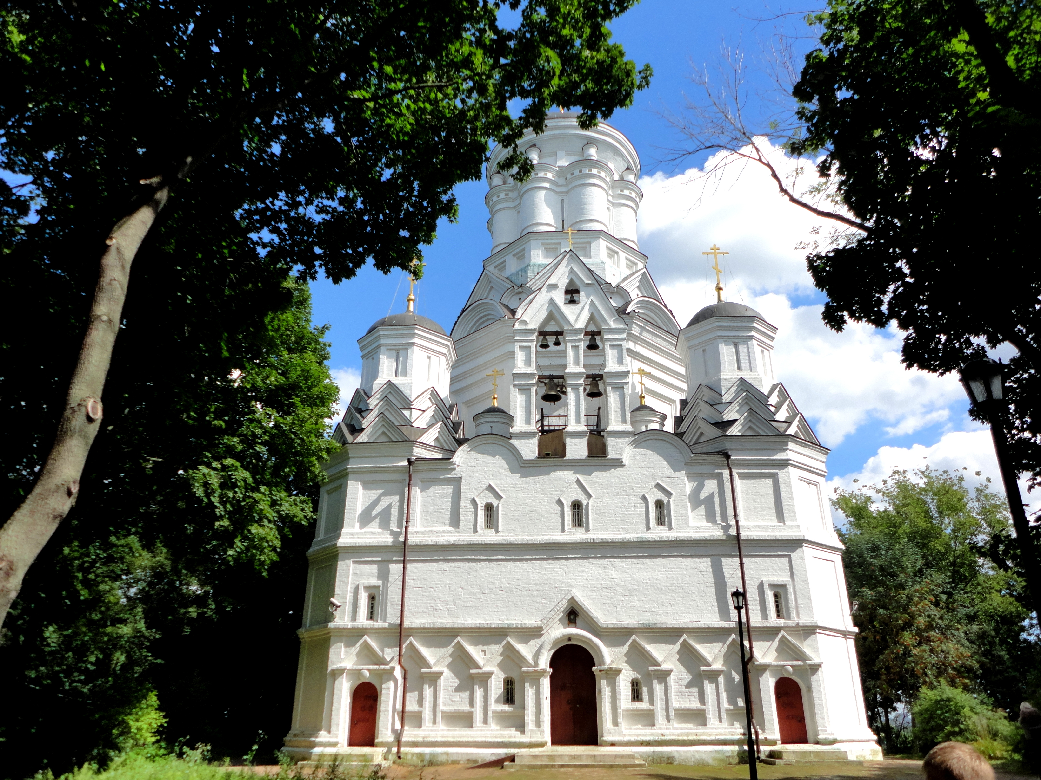 Ансамбль усадьбы Коломенское: проспект Андропова, дом 39, строение 6, Нагатинский Затон, Южный округ, Москва